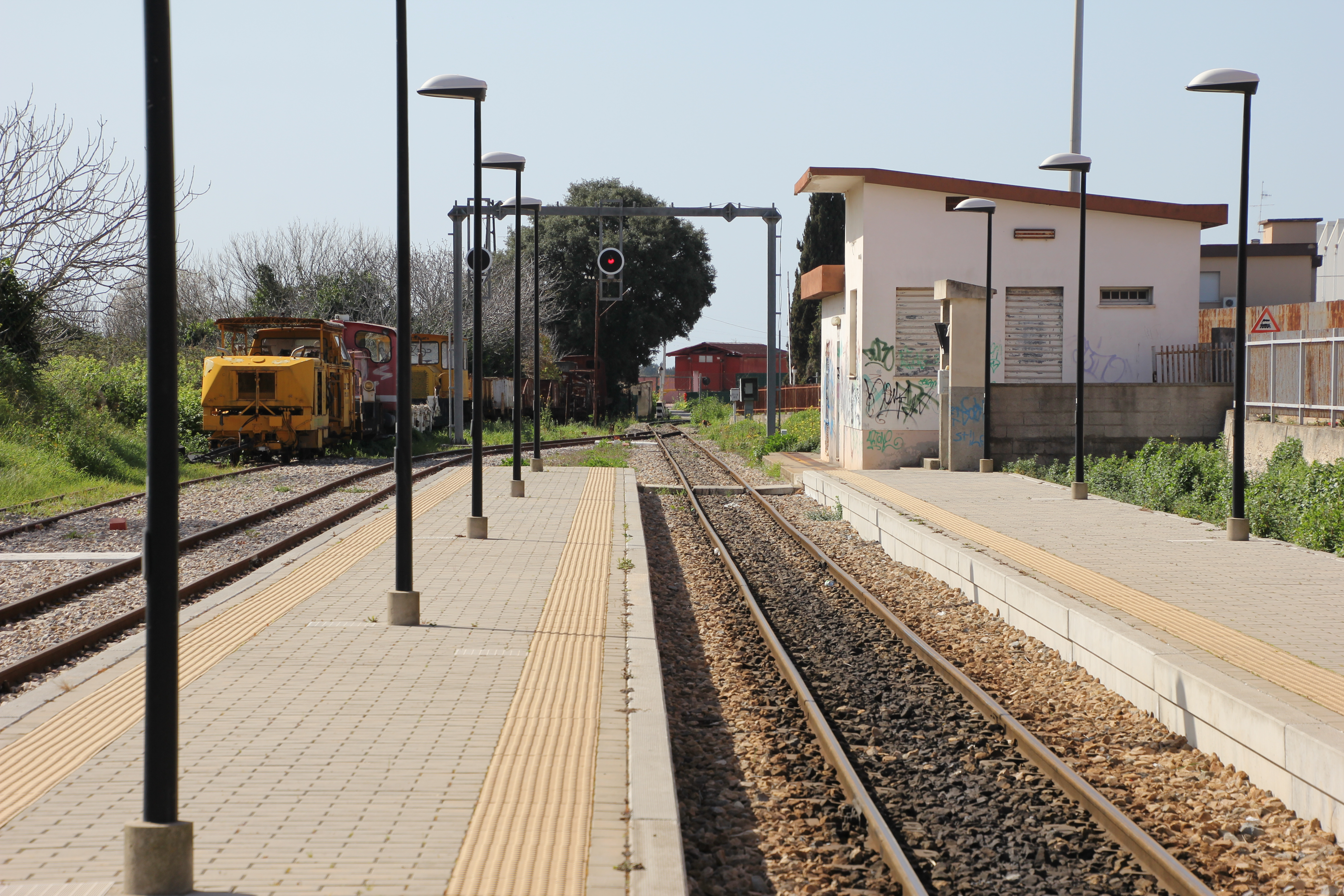 Sassari, stazione ferroviaria di Sassari Santa Maria